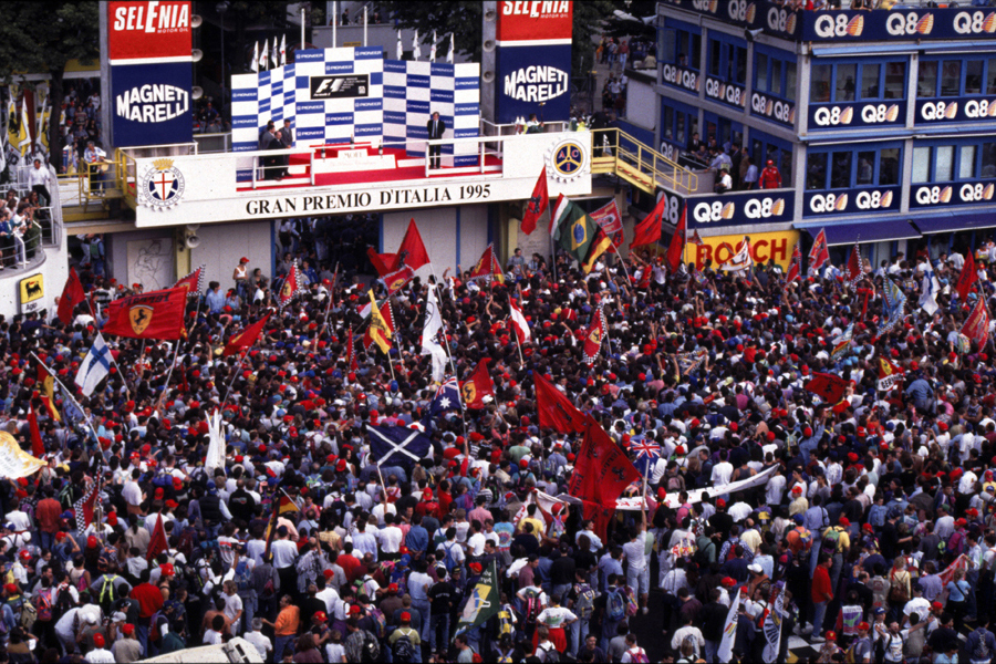 Podium Grand Prix de Monza en 1995 Mis en ligne le 12 avril 2008